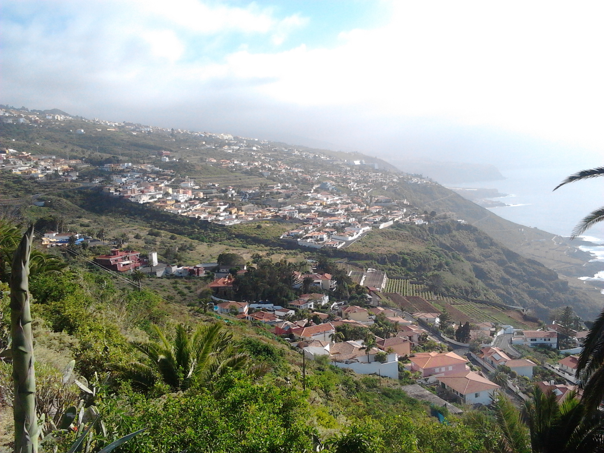 Vista del municipio de El Sauzal, en la isla de Tenerife (Canarias, España).